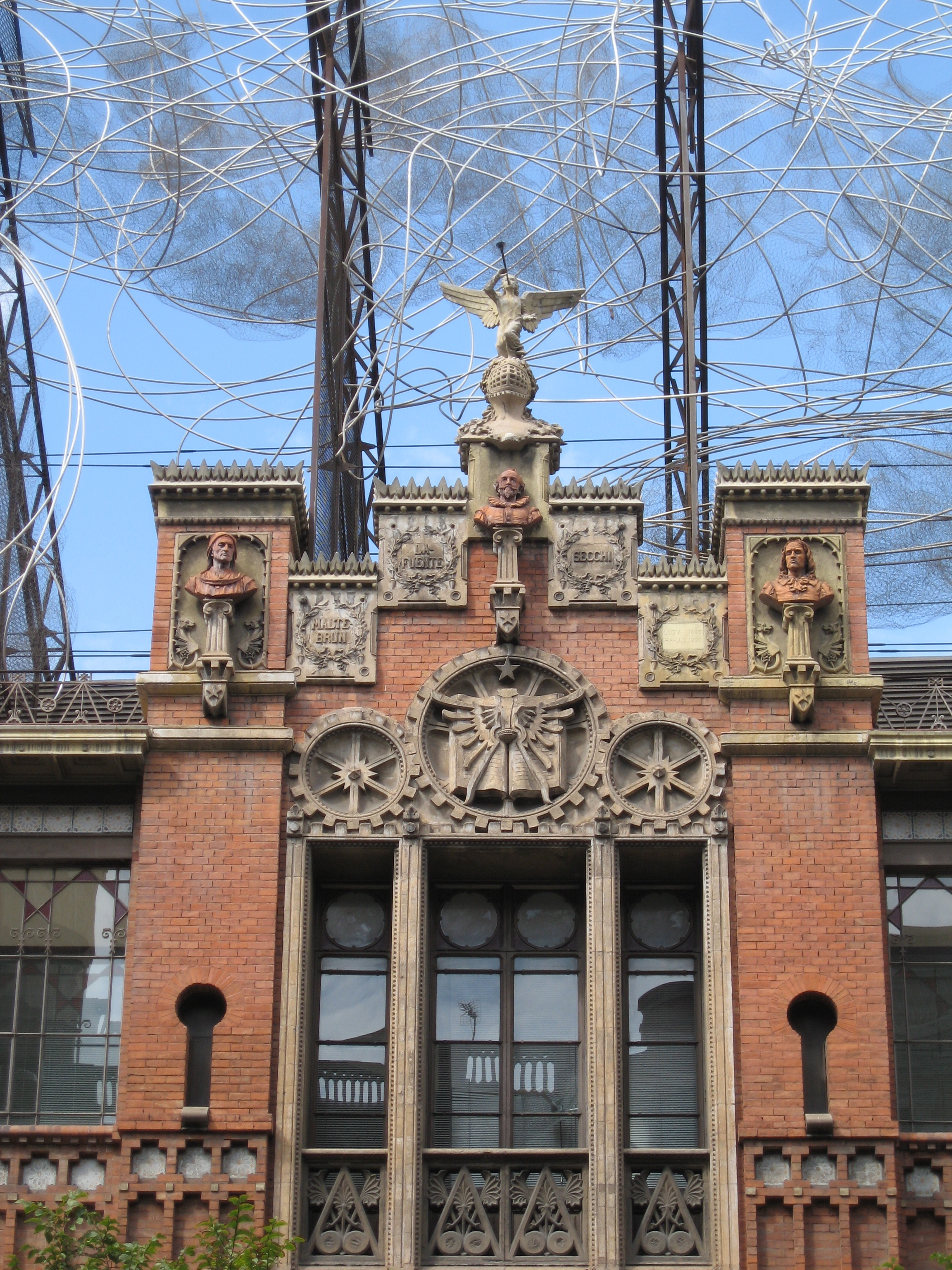 Fundació Antoni Tàpies, Lluís Domènech i Montaner, architect